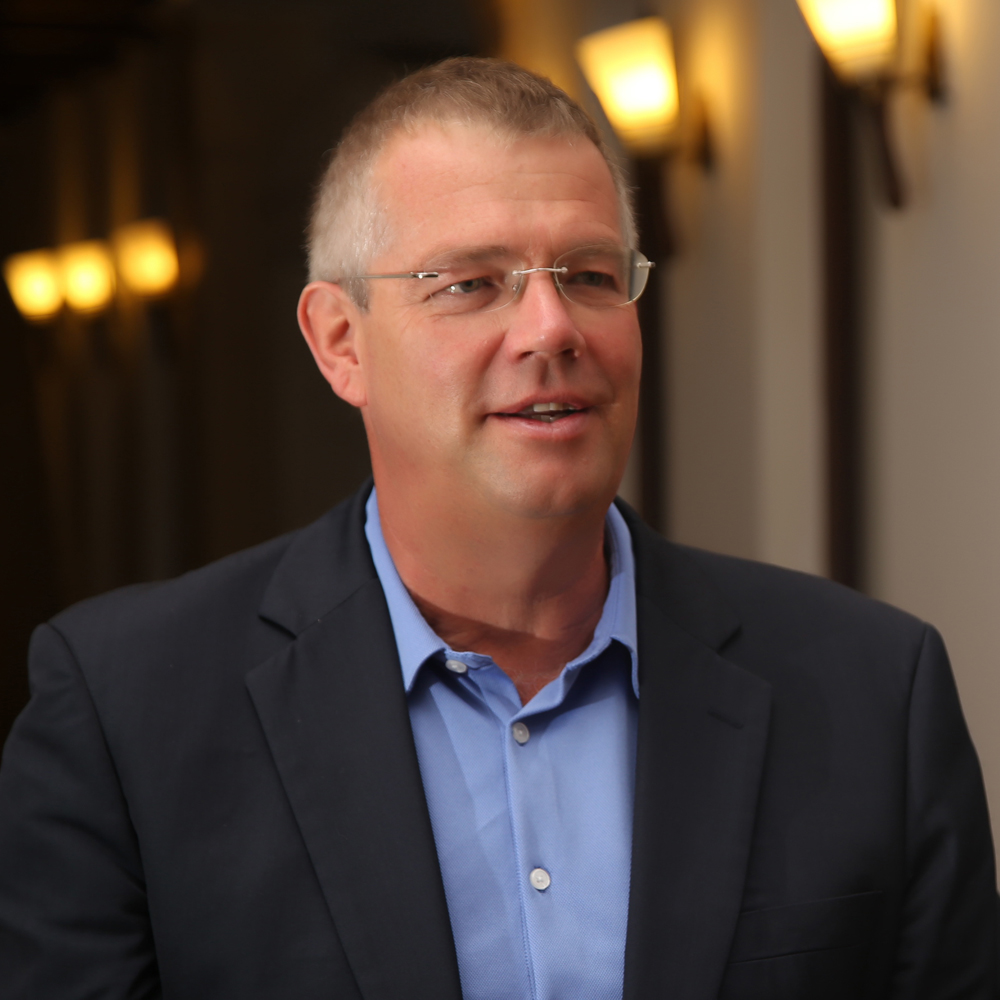 Prof. Wolfgang Hünnekens (2018)